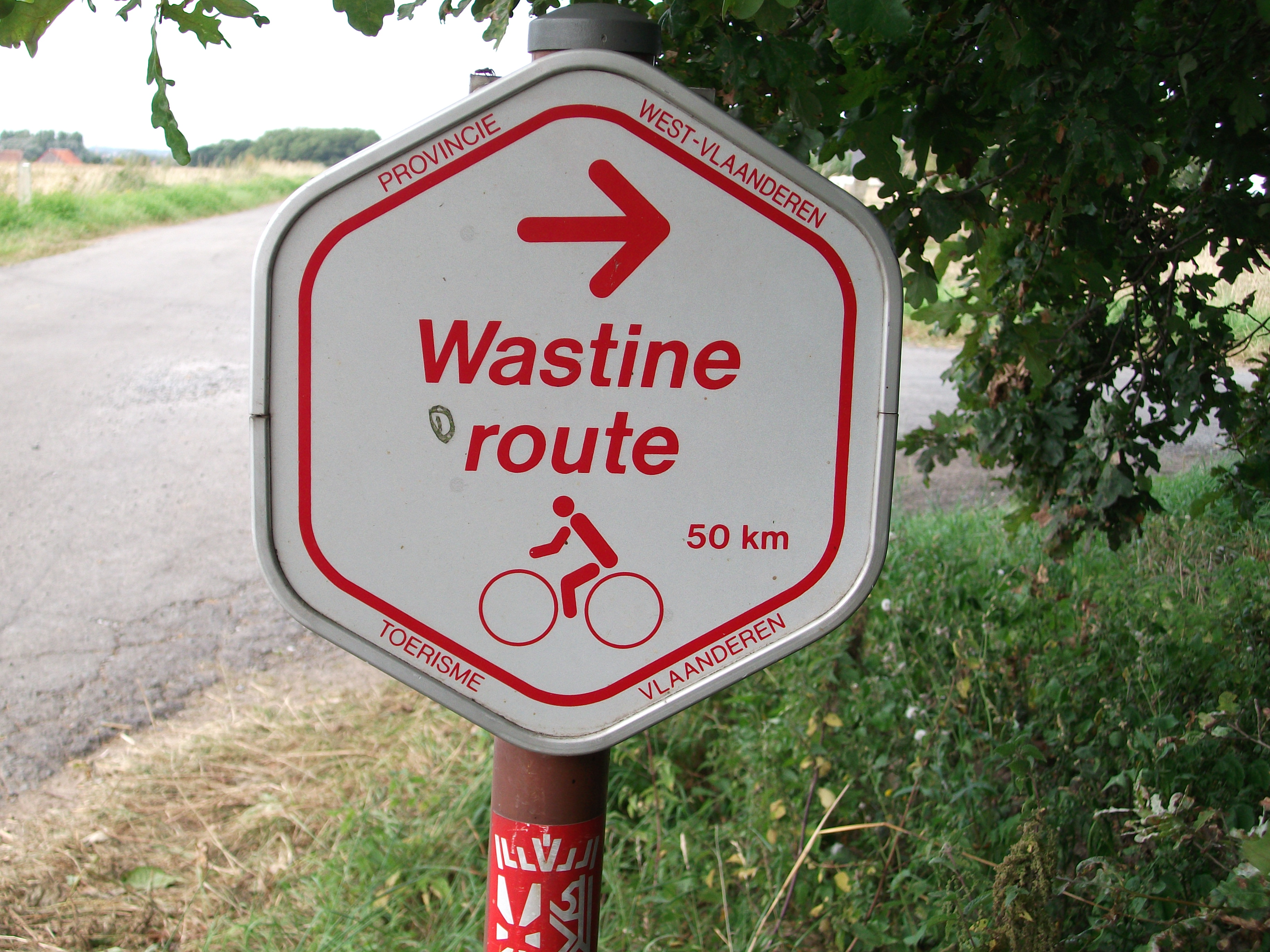 West-Vlams: Wastineroute-plakoat